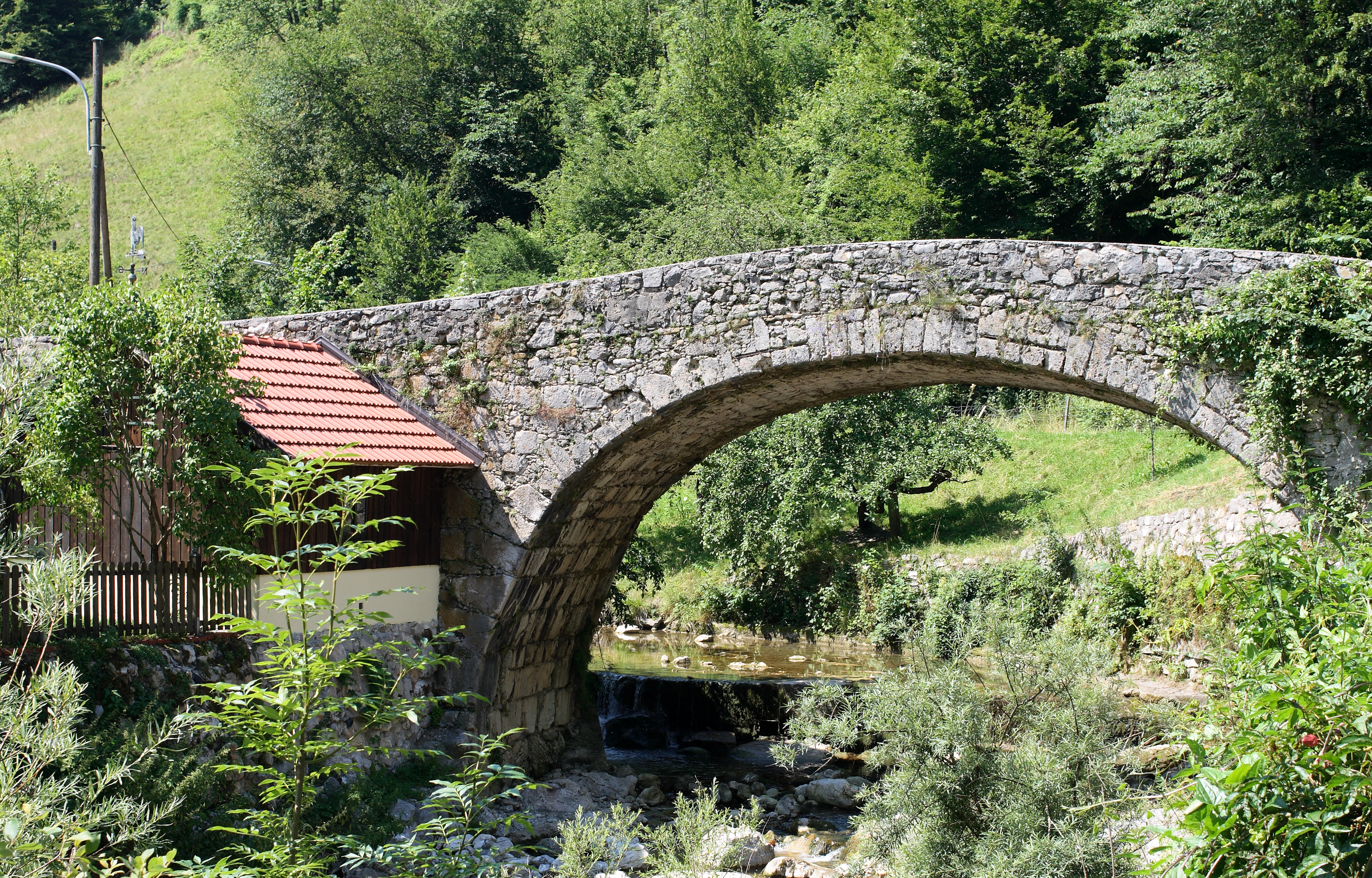 Sogenannte alte Römerbrücke bei Schloss Leonstein in Grünburg. Die Bogenbrücke in Stein ersetzte 1787 eine Vorgängerkonstruktion.[1]